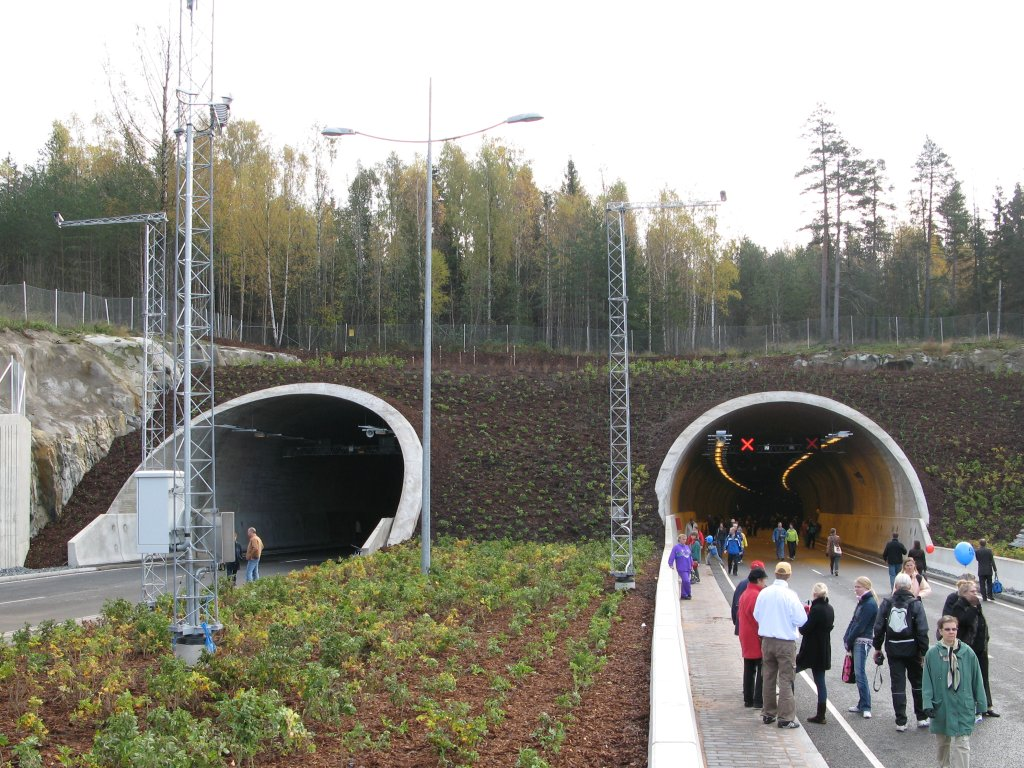 Vuosaaren tietunneli valmiina yleisöpäivänä